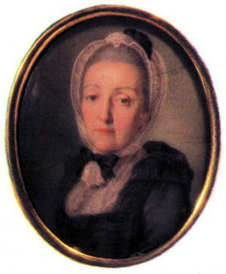 Княгиня Анна Даниловна Трубецкая, мать поэта Хераскова